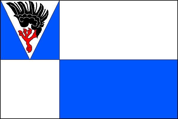 Vlajka obce Soutice